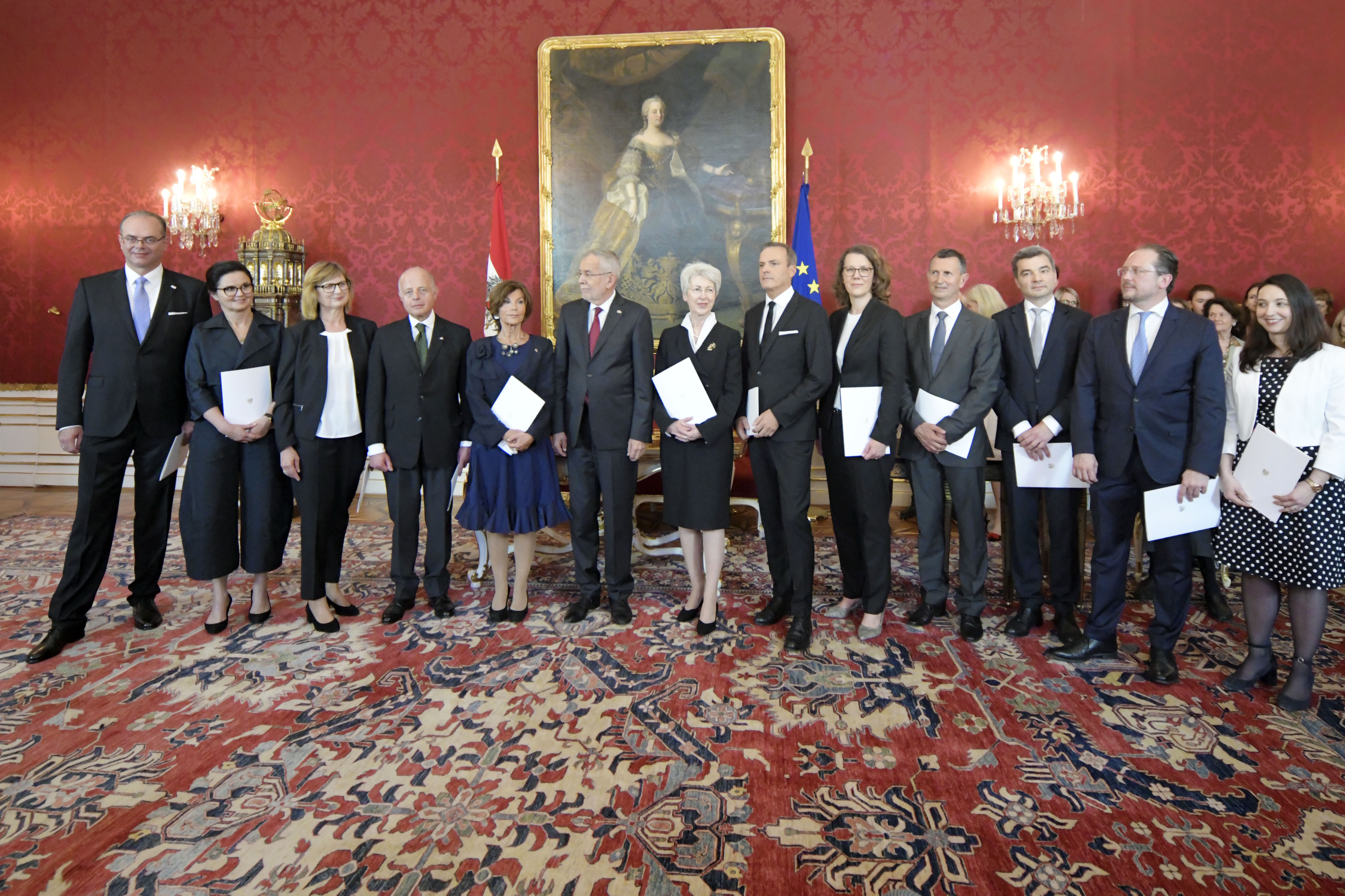 Am 3. Juni 2019 wurde Mag. Alexander Schallenberg als Bundesminister für Europa, Integration und Äußeres angelobt.